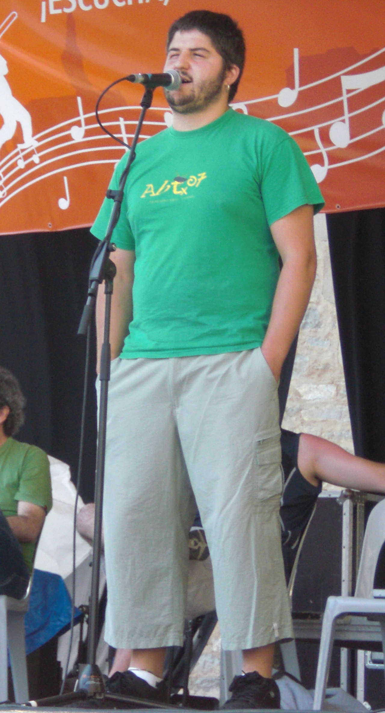 Iñaki Viñaspre bakarkako lanetan 2008ko Gasteizko jaietan